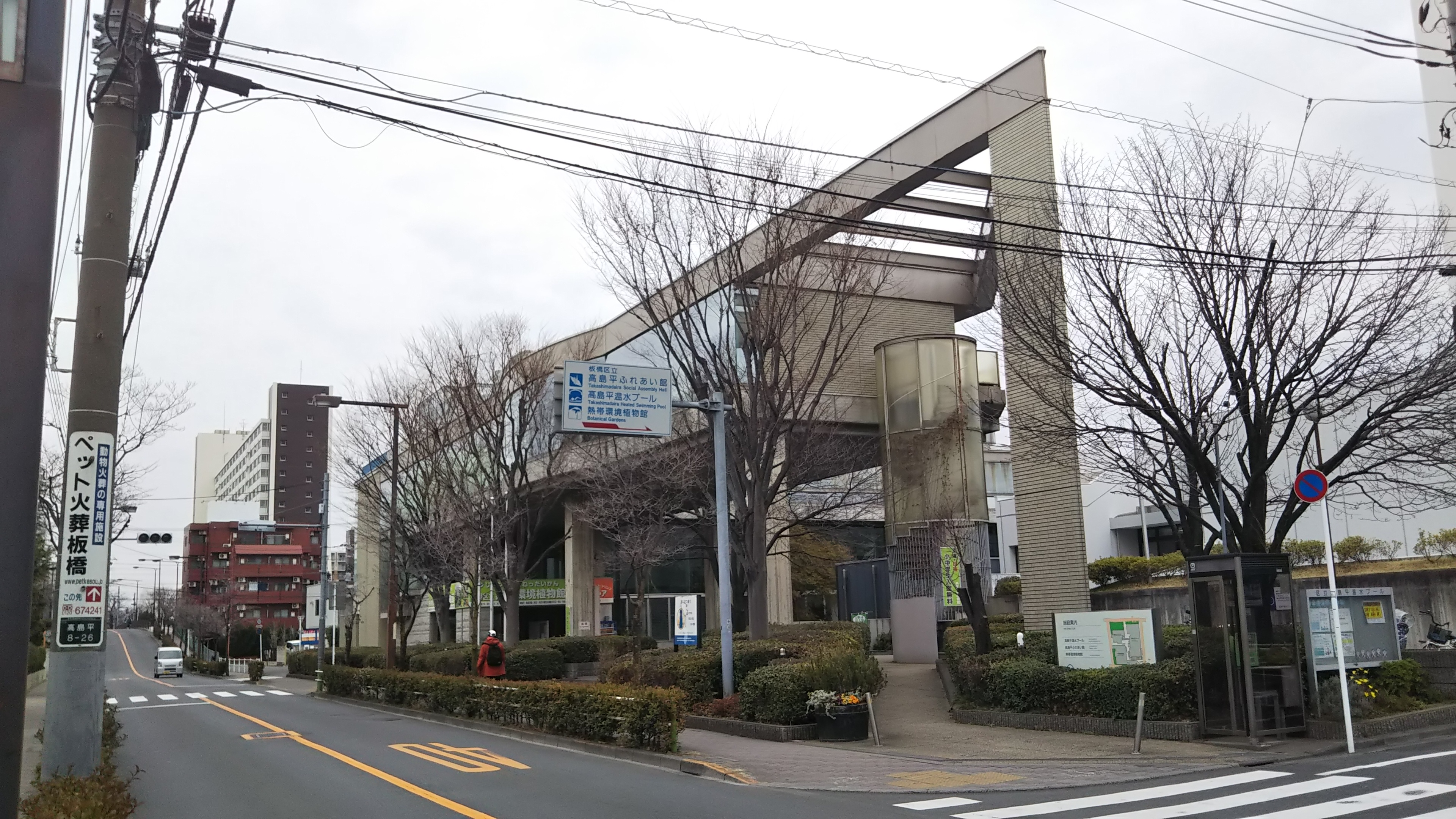 板橋区立熱帯環境植物館、建物外観